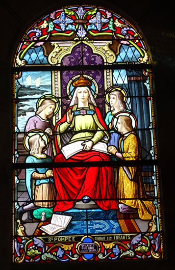 Trezeni. Iliz. Gwerenn livet. Koupaia